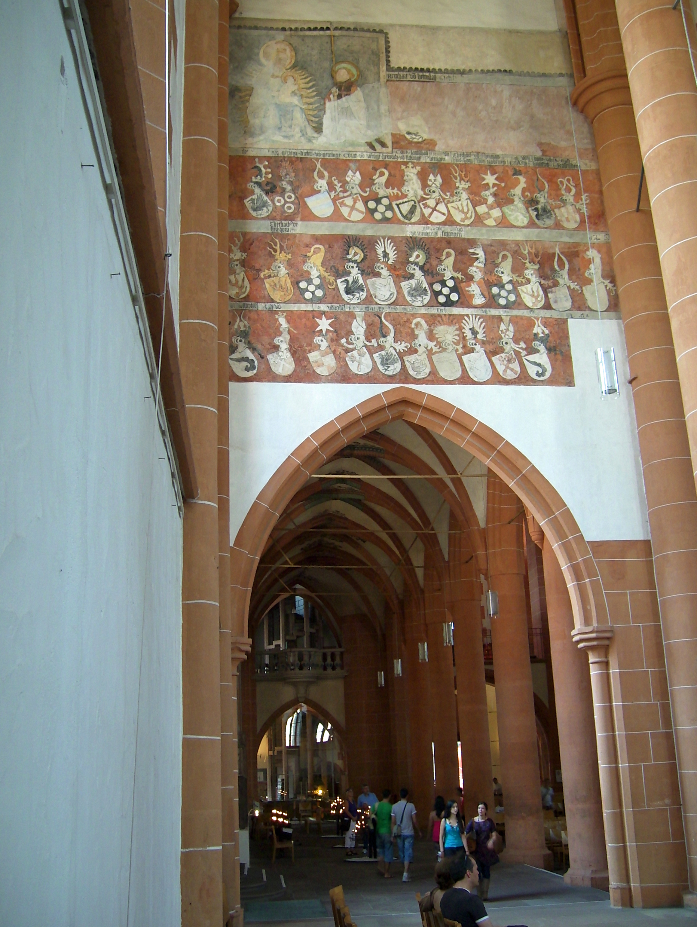 Heiliggeistkirche Heidelberg Seitenschiff Wappen der Gesellschaft mit dem Esel